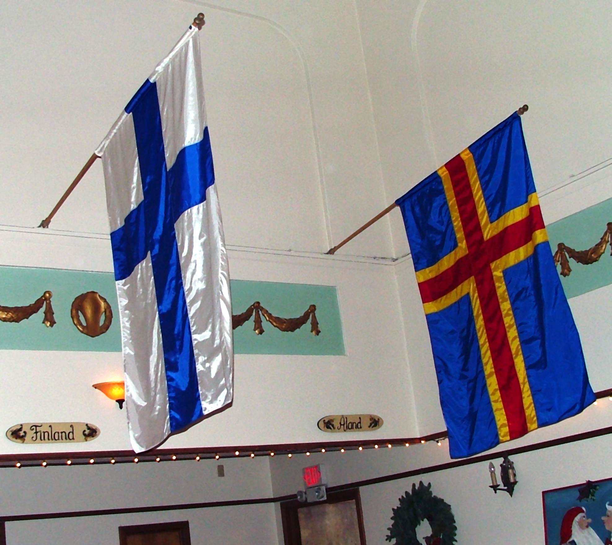 Bandeira das Illas Åland xunto a bandeira de Finlandia.